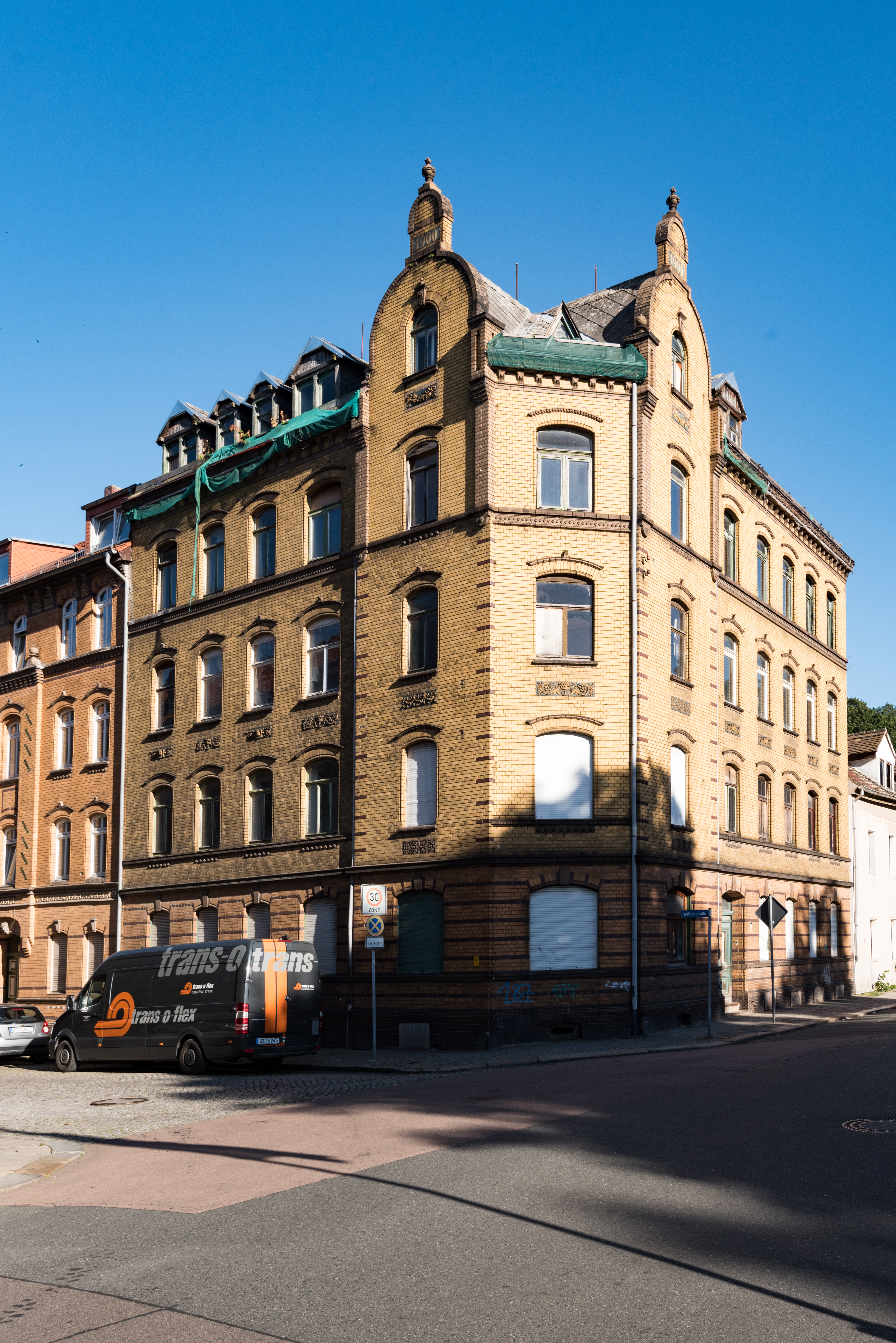 Weißenfels, Kleine Deichstraße 13